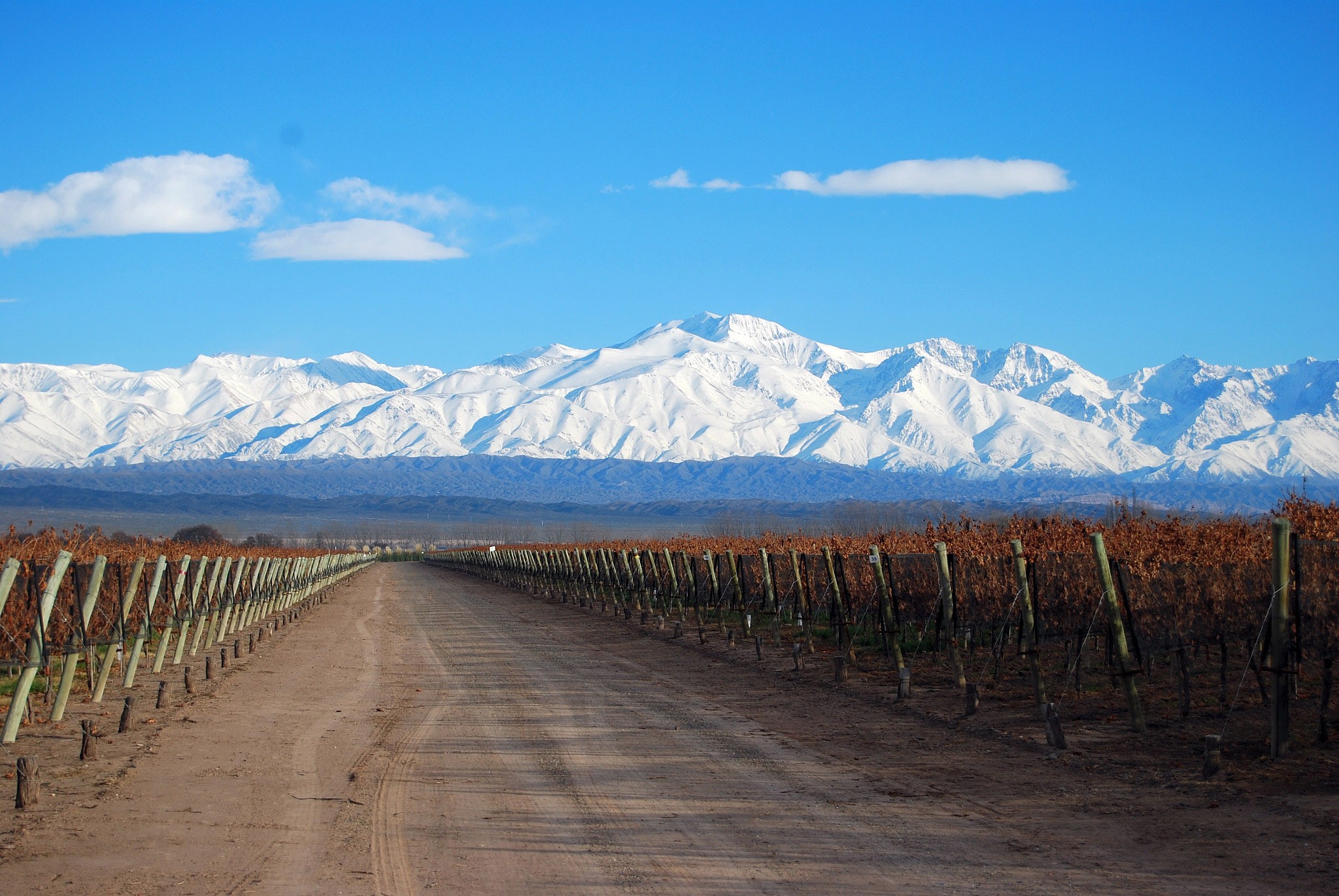 Plantacion de Bodega Chakana en Agrelo, Lujan de Cuyo, Mendoza.